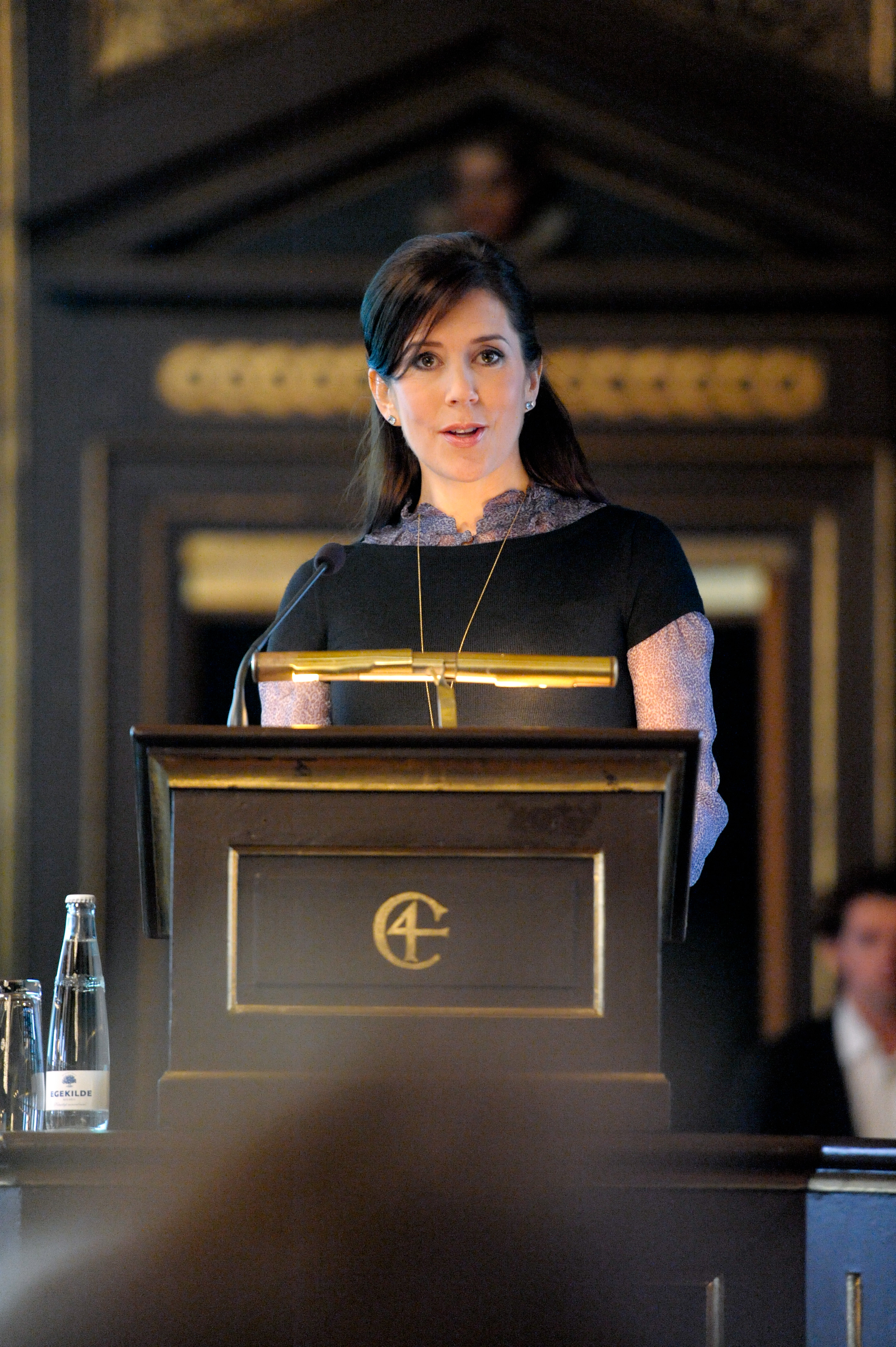 HKH Kronprinsessan Mary av Danmark öppnar Kreanord konferensen i Köpenhamn